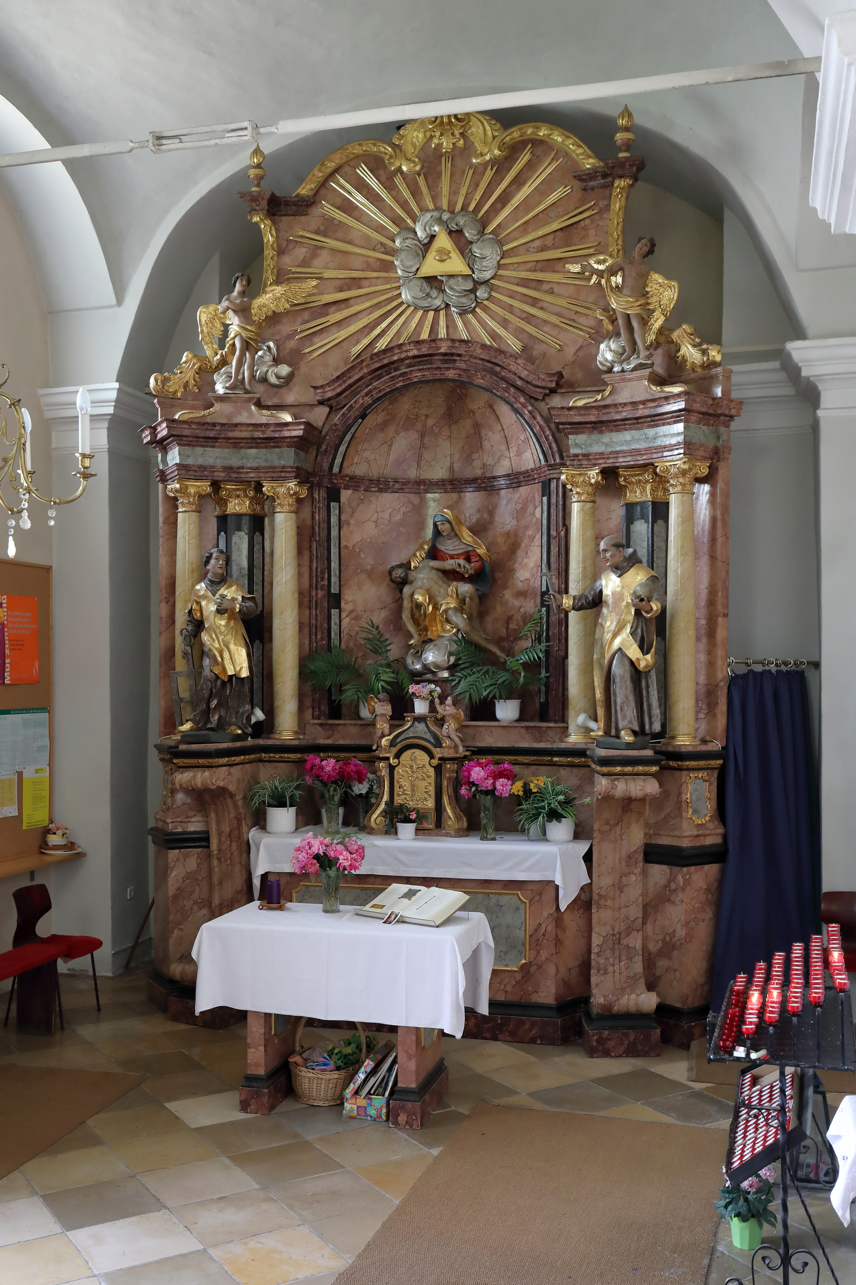 Hochaltar der ursprünglichen Kapelle und jetzt Seitenalter der Pfarrkirche von Gablitz, Niederösterreich.